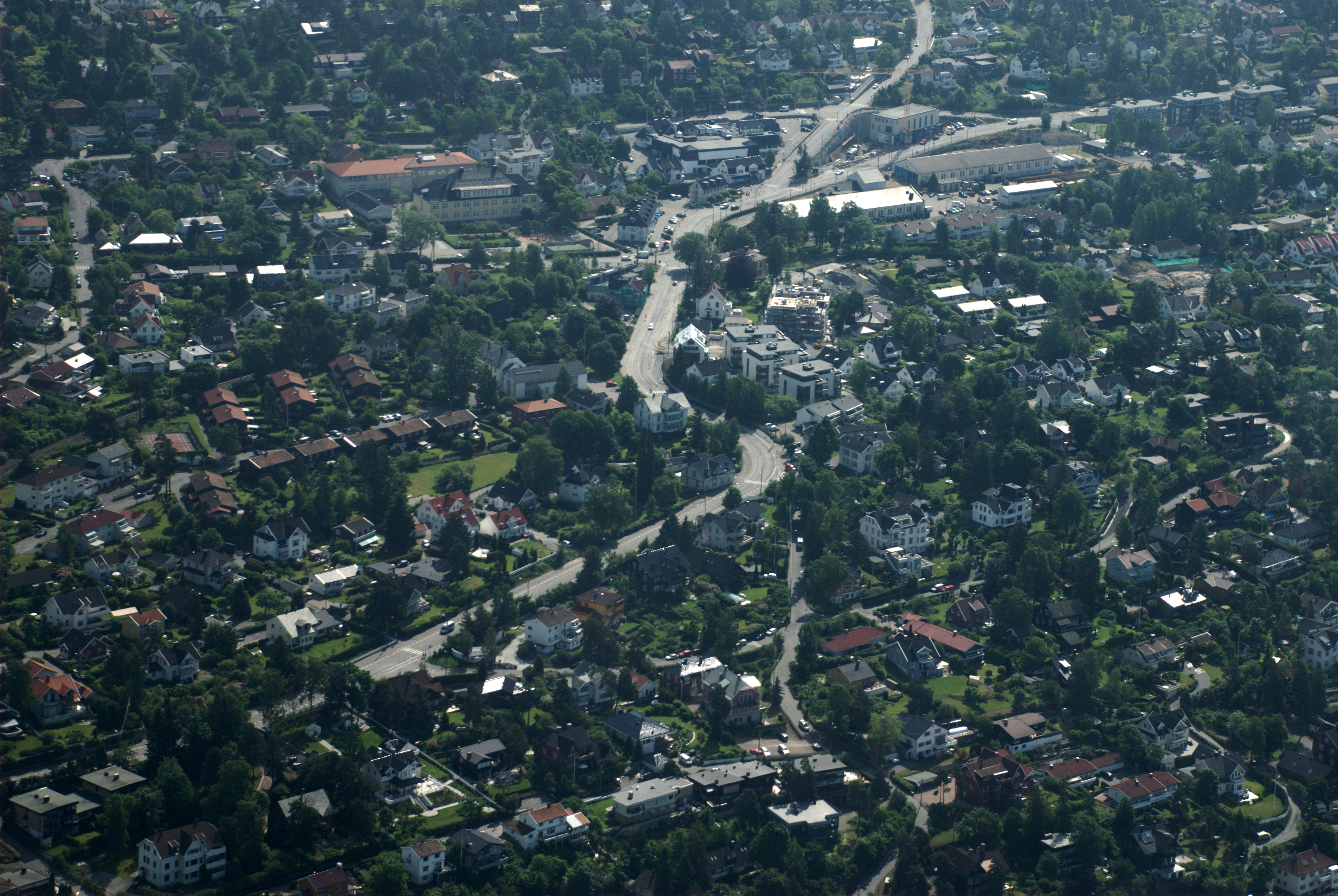 Holtet på Bekkelaget i Oslo